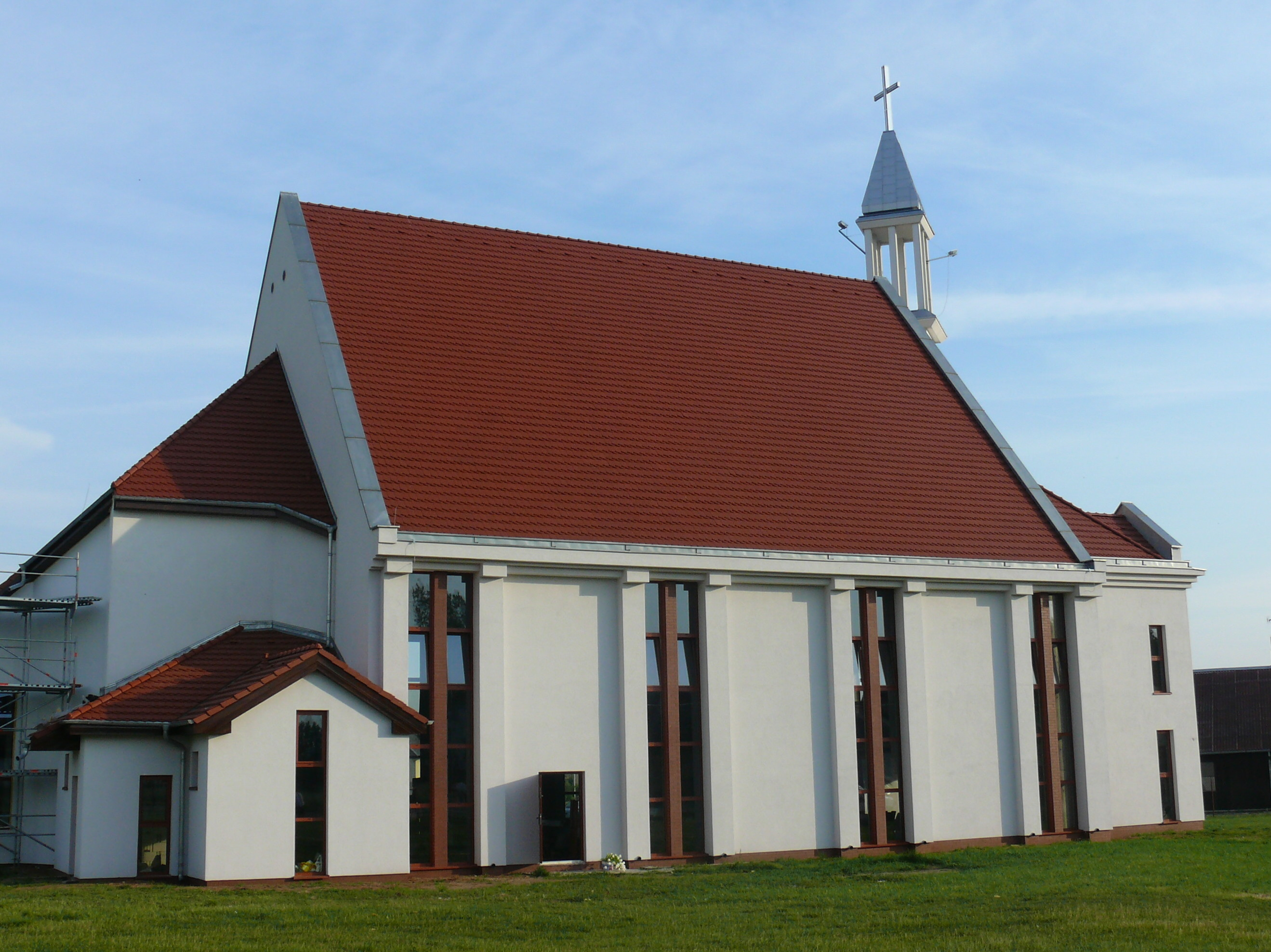 kościół św. Bogumiła w Kole